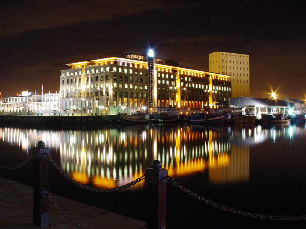 Nedbank/BOE building at night